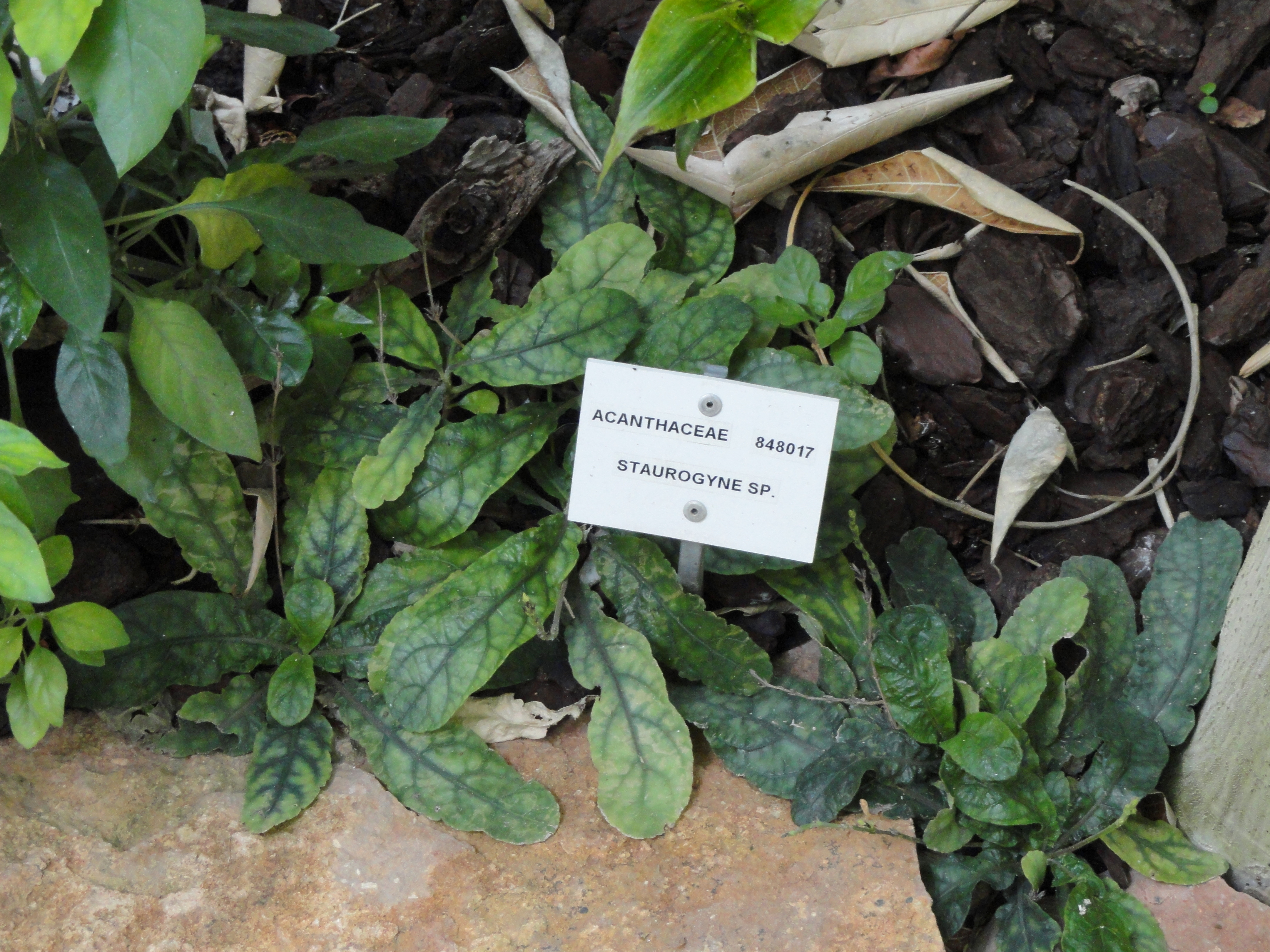 Staurogyne sp. specimen in the Jardin Botanique de Lyon, Parc de la Tête d'Or, Lyon, France.